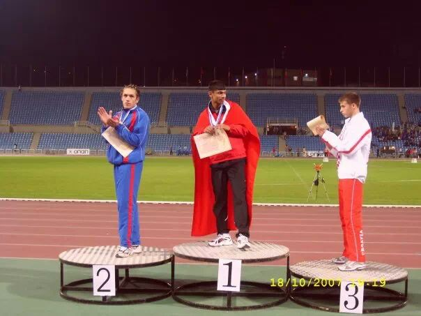 Avrupa şampiyonası